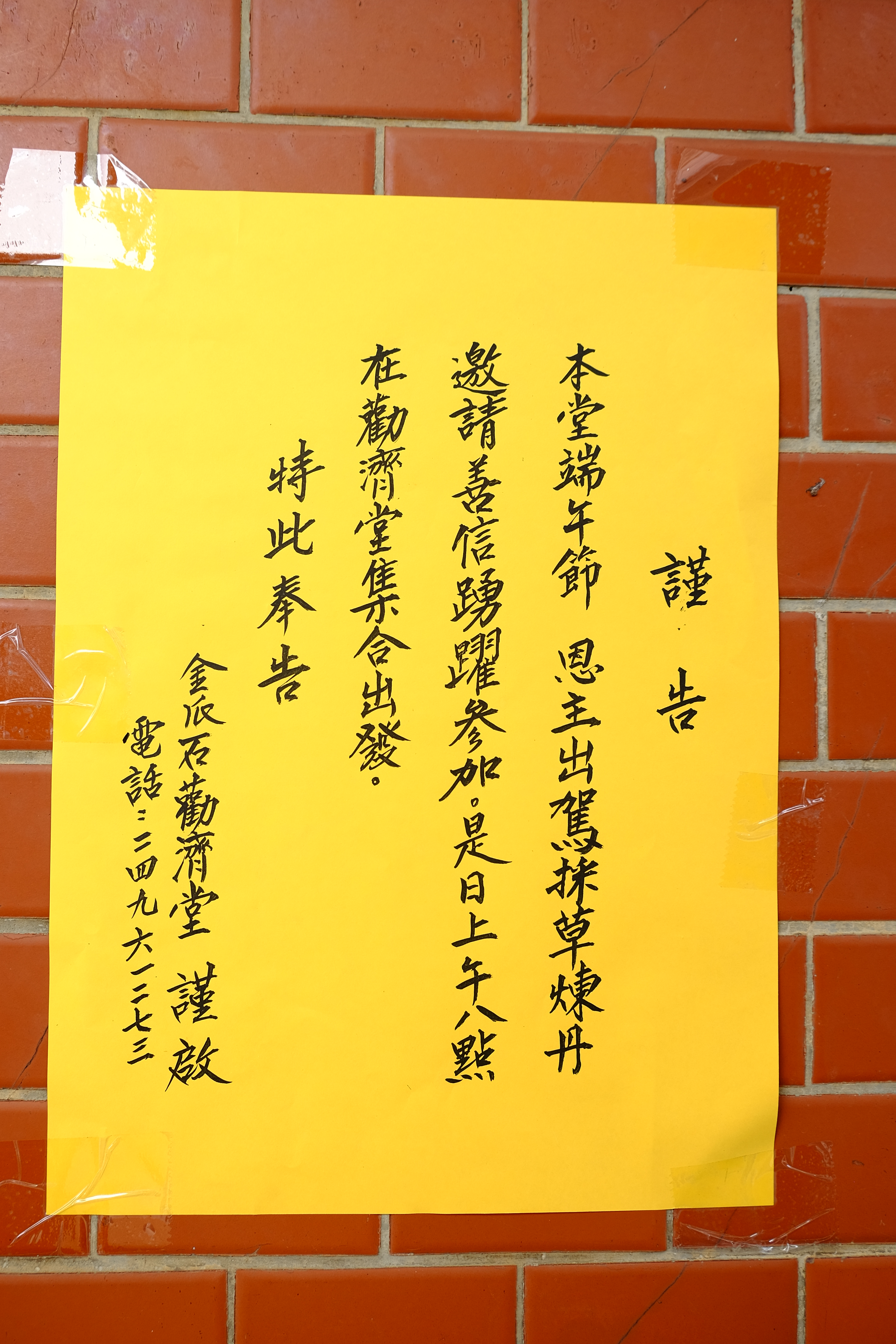 2018Cyuanji Temple Religious Rituals bullet 2018年勸濟堂端午節採草煉丹活動告示